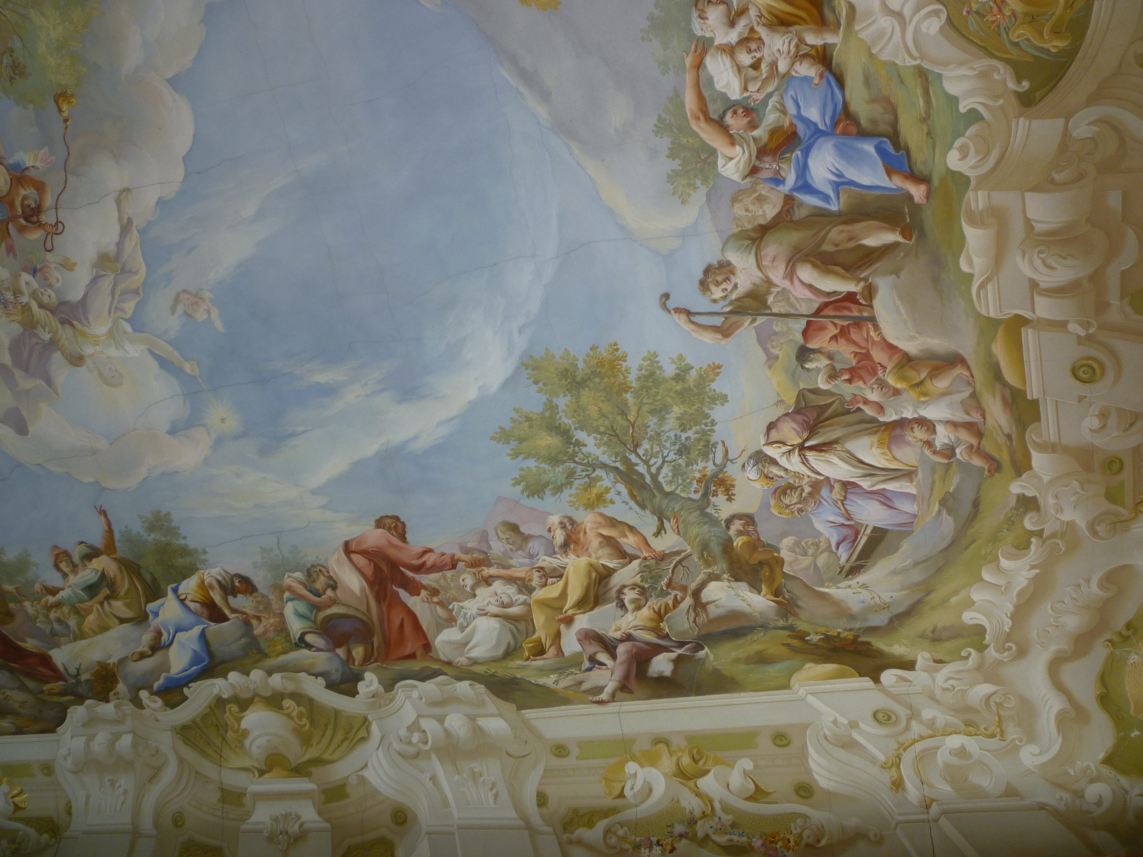 Deckenfresko im Marmorsaal des Stiftes Geras von Paul Troger (1738): die wunderbare Brotvermehrung